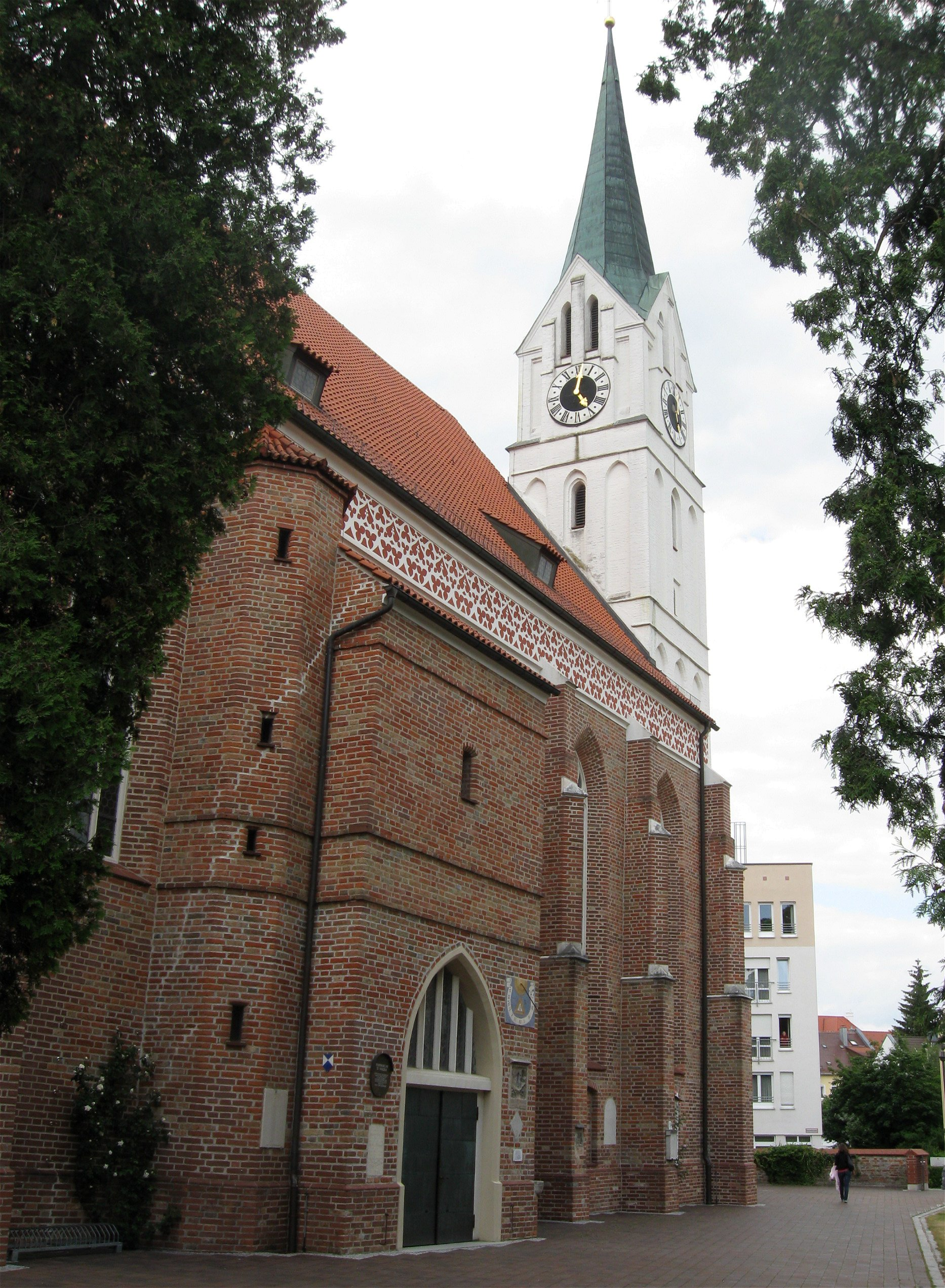 Nikolastraße 43; Katholische Pfarrkirche St. Nikola, Sog. "Alt-St.-Nikola", dreischiffige spätgotische Hallenkirche, fertiggestellt 1481, mit älterem Turm und einschiffigem Chor von 1389/90 (dendro. dat.); mit Ausstattung; sog. "Neu-St.-Nikola", über eingeschossigen Verbindungstrakt verbundener Zentralbau in Kreuzform, 1966 - 1967 von Hans Döllgast; mit Ausstattung. D-2-61-000-428